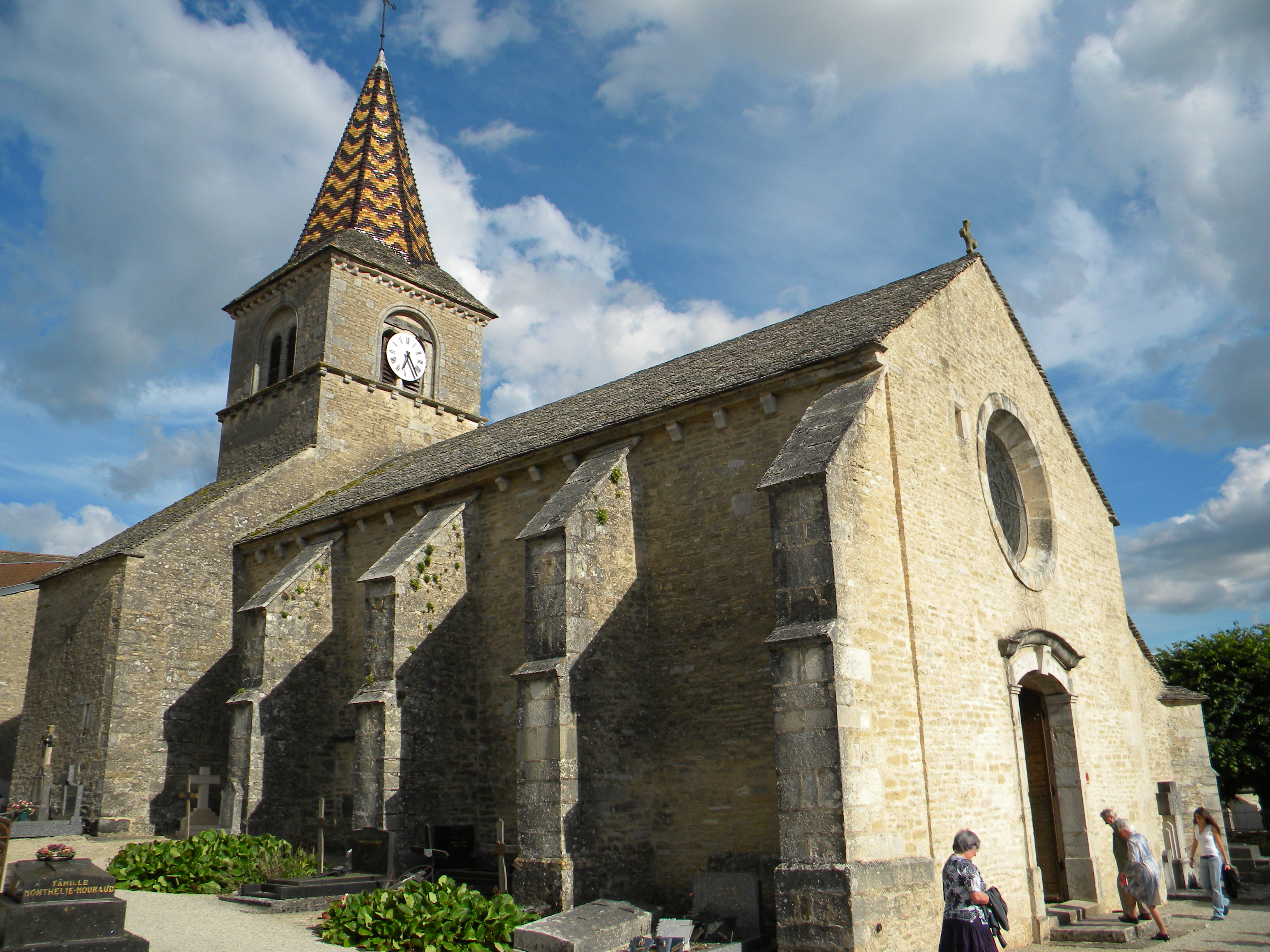 Eglise de Monthelie